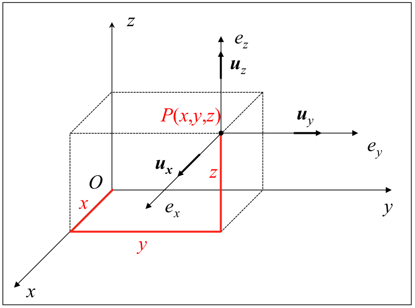 Koordenatu kartesiarren definiziorako eskema grafikoa.